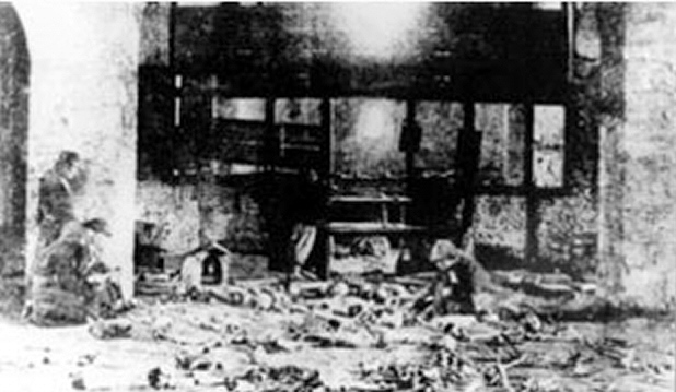 Batak massacre Nachträglich inszenierte Gebeine in der Kirche von Batak Bulgarien 1886-1888